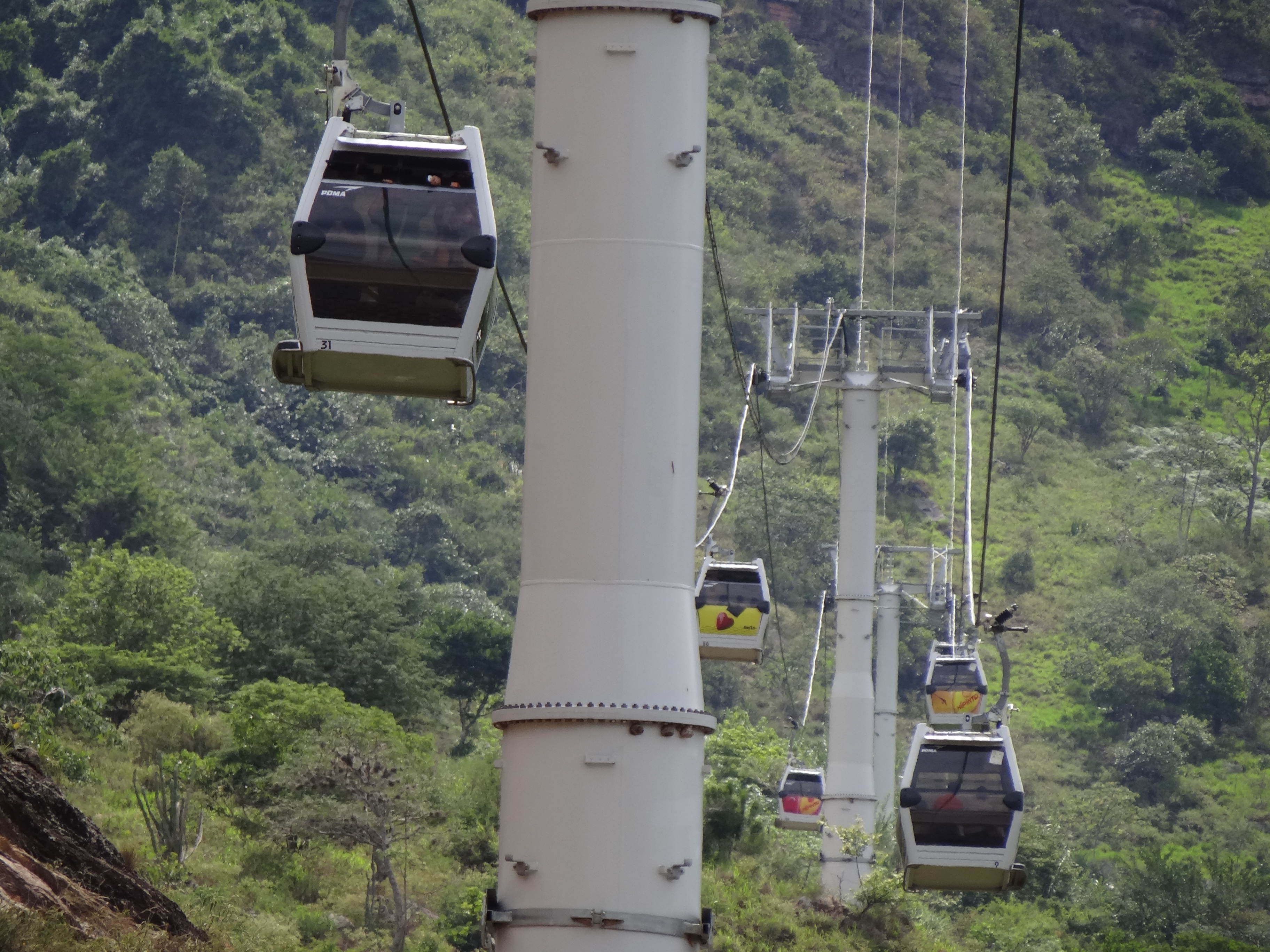 Teleférico en el Parque Nacional del Chicamocha